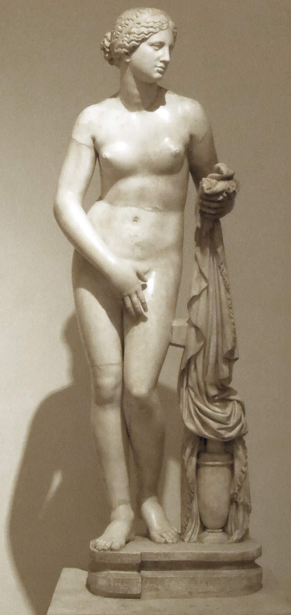 Roma, Museo nazionale romano a palazzo Altemps, statua di Afrodite Cnidia dalla collezione Ludovisi (attestata a Villa Ludovisi dal 1623). Copia romanaSono di restauro la testa (opera di Ippolito Buzzi sul modello della Niobe Ludovisi, anteriore al 1623), le braccia, il panneggio con l'hydria e le gambe con piedistallo (con frammenti antichi non pertinenti). Fonte: scheda su Monumenta rariora, sul sito della Scuola normale superiore di Pisa.